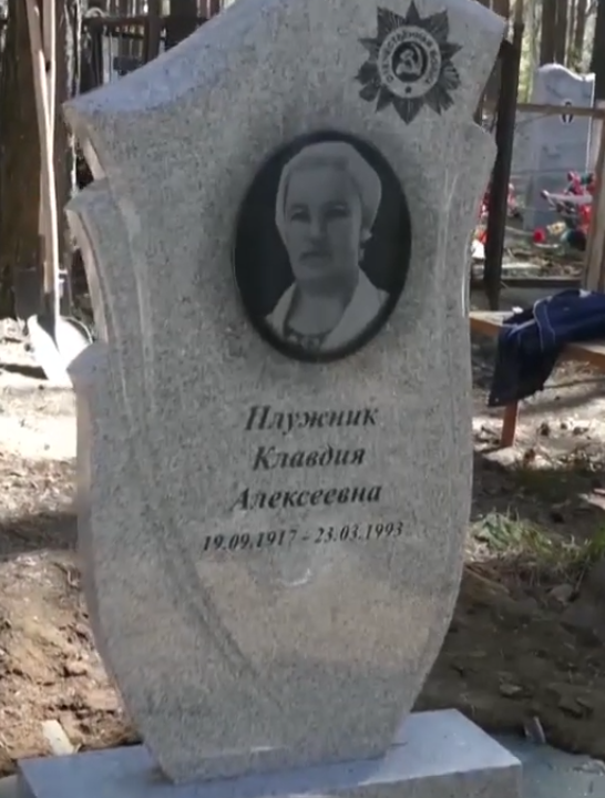 Памятник Клавдии Плужник в посёлке Увильды